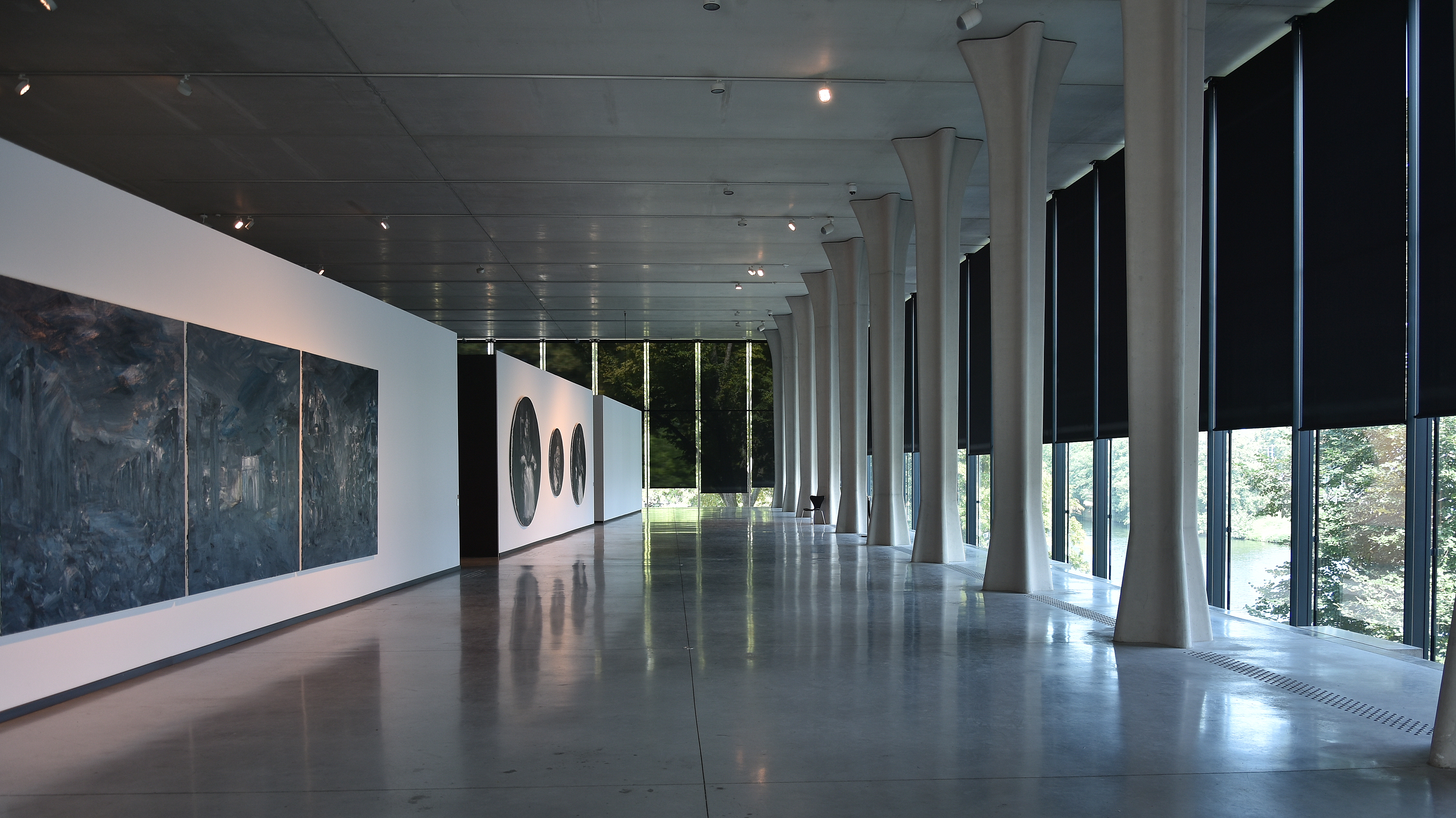 La Boverie Luik 23-08-2018 13-24-38 This photo of immovable heritage has been taken in the Walloon Region